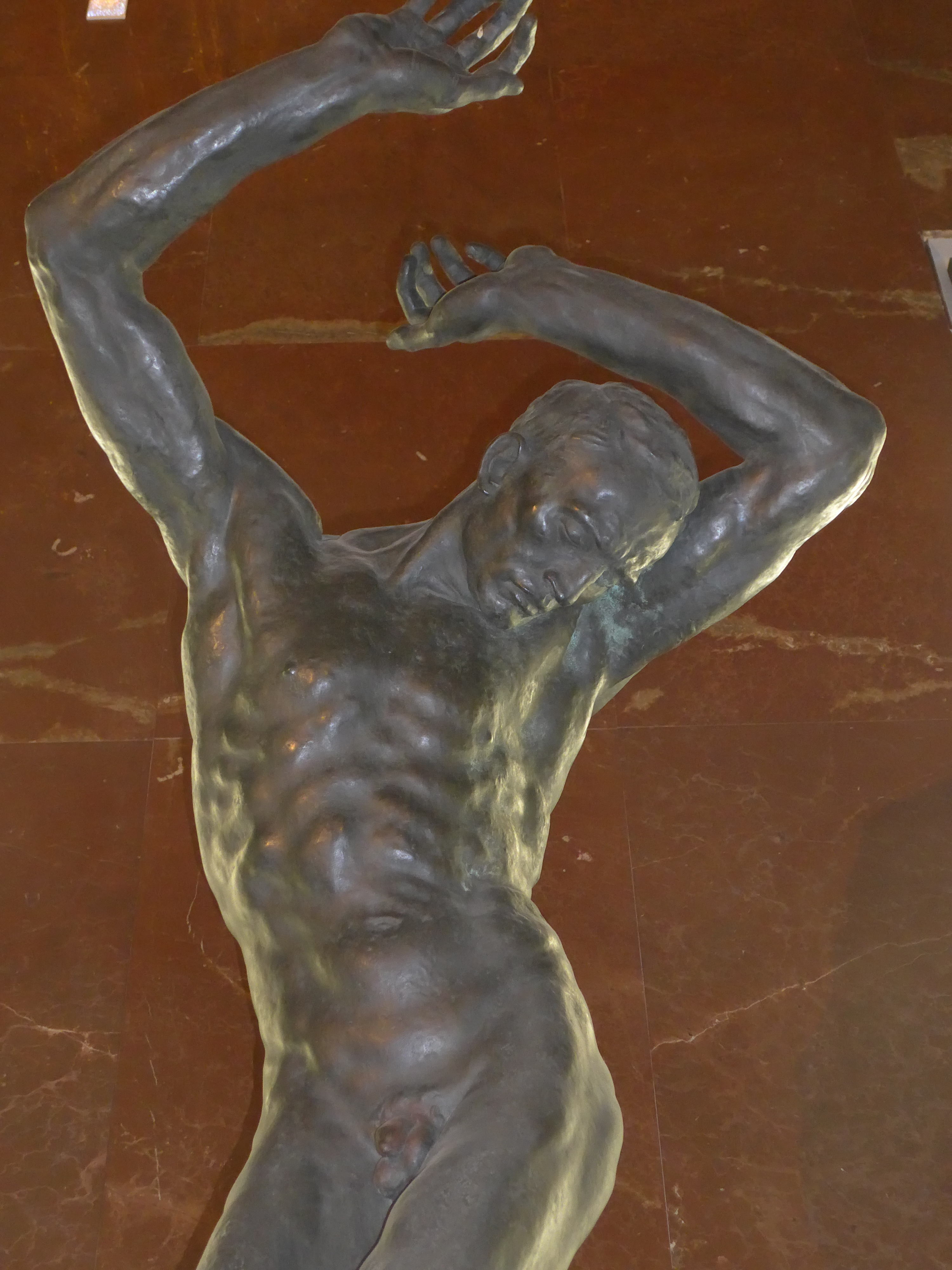 Detail bronzové sochy v Národním památníku v Praze